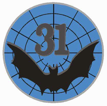 WZÓR GRAFICZNY ODZNAKI ROZPOZNAWCZEJ 31. BATALIONU RADIOTECHNICZNEGO